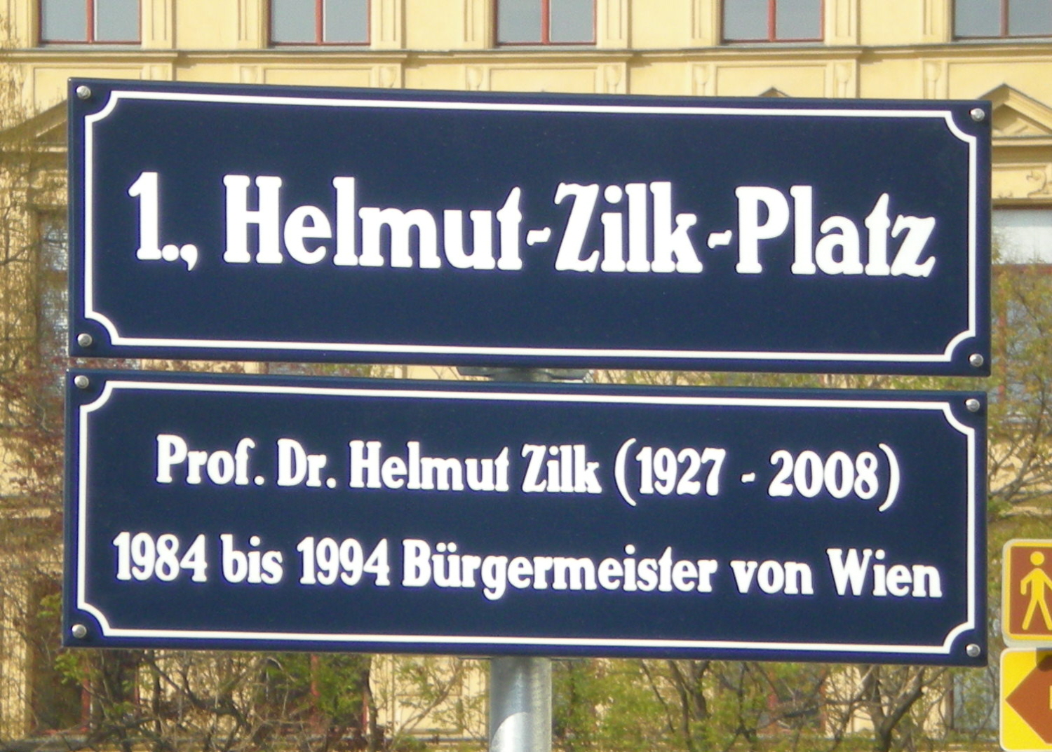 Strassentafel des neu benannten Helmut-Zilk-Platzes in Wien